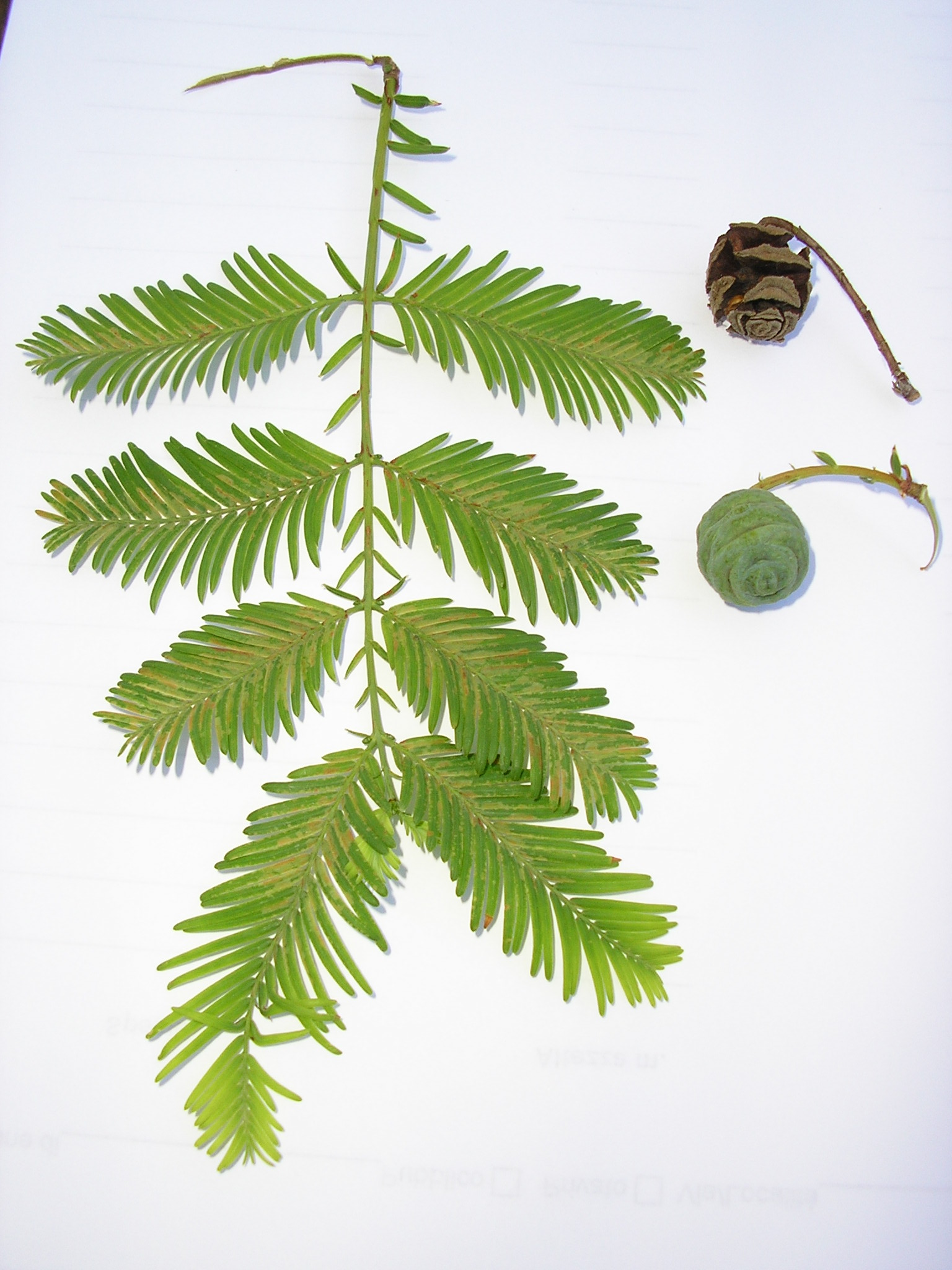 Autore: Reedj. Ramo con foglie e strobili (quello in alto maturo e lignificato) di Metasequoia glyptostroboides